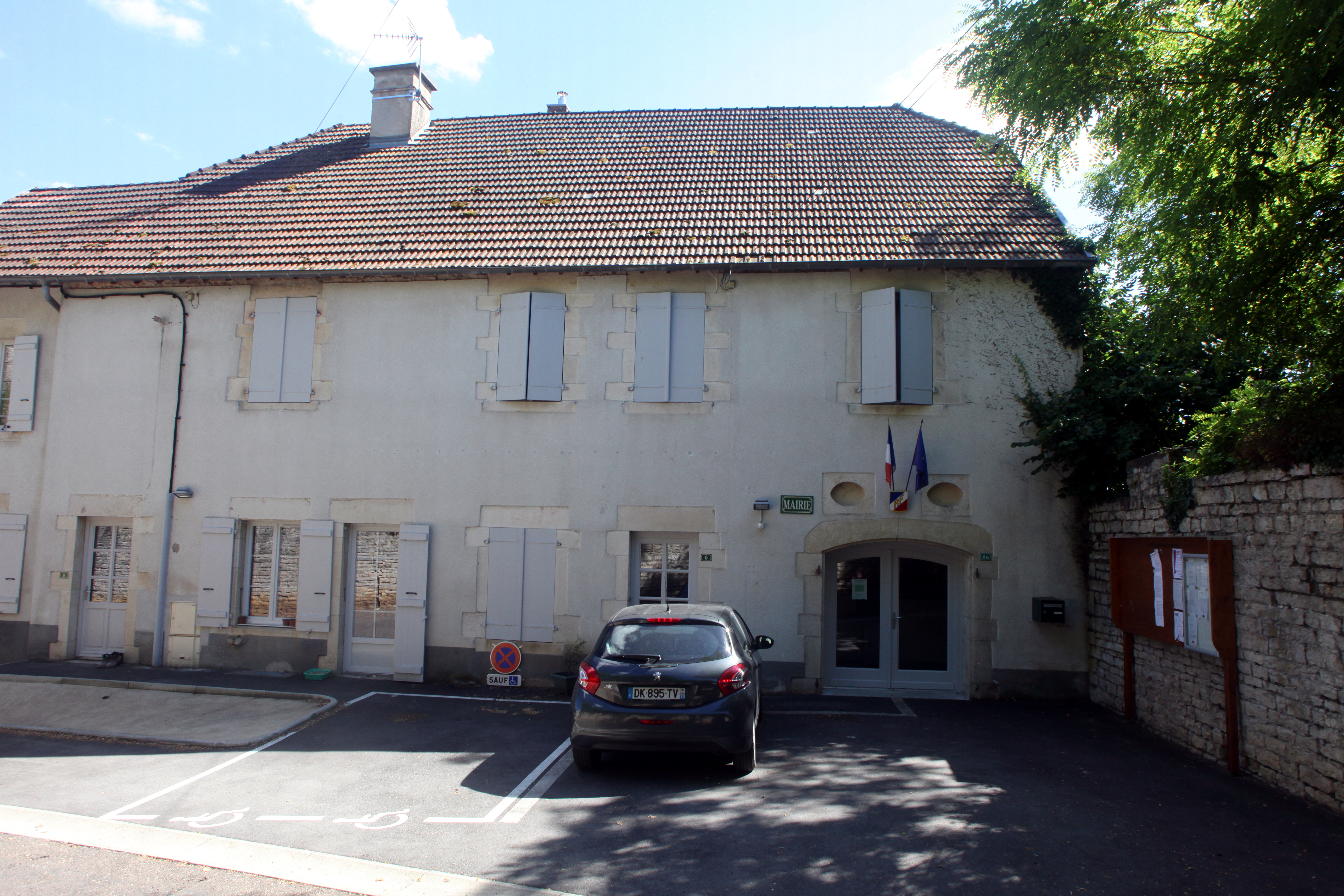 Mairie de Malans (Haute-Saône).